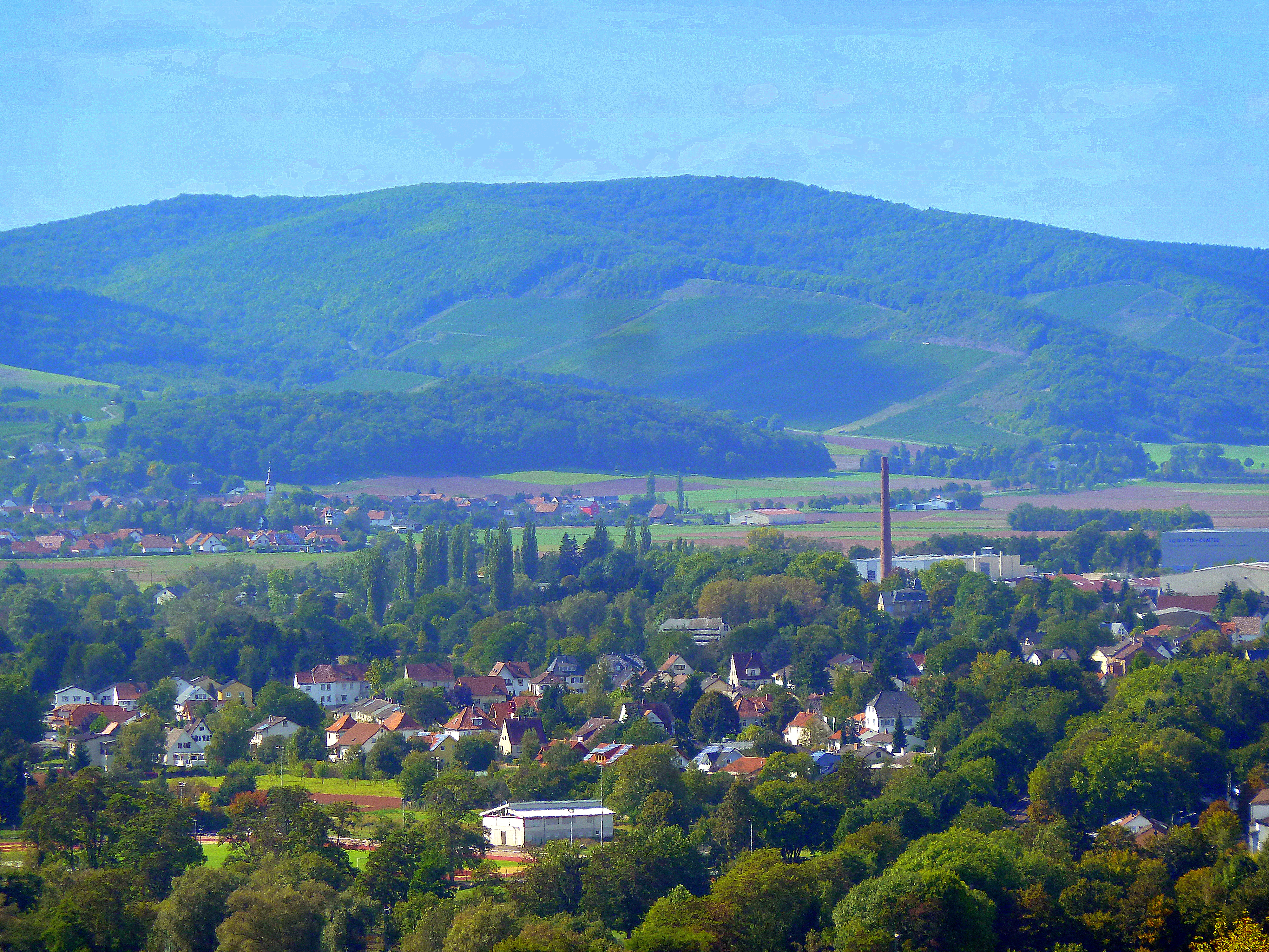 Blick vom Aussichtsturm am Weinbergterrassen- und Orchideenpfad nach Bad Sobernheim und Meddersheim